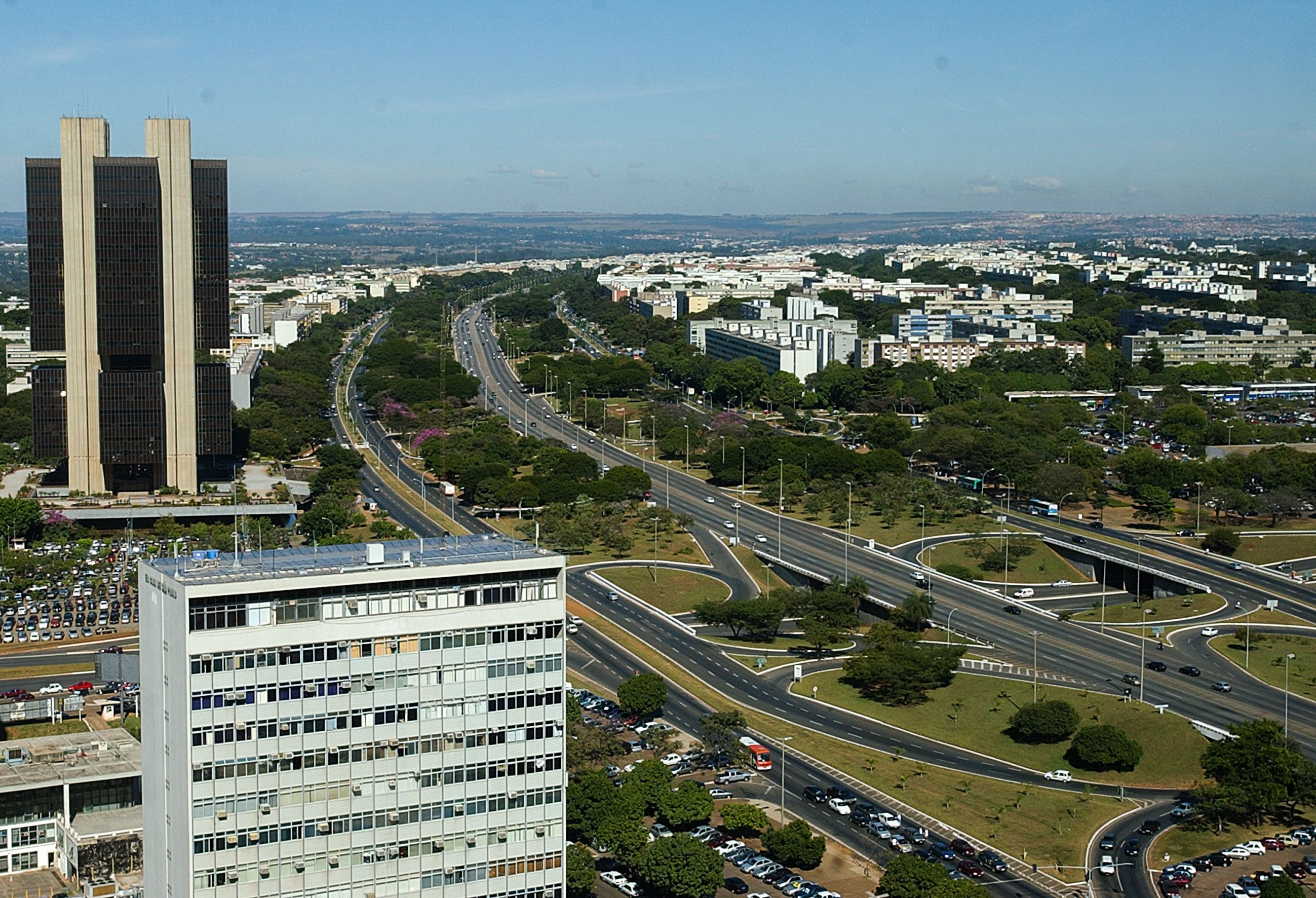 Brasília - A capital federal